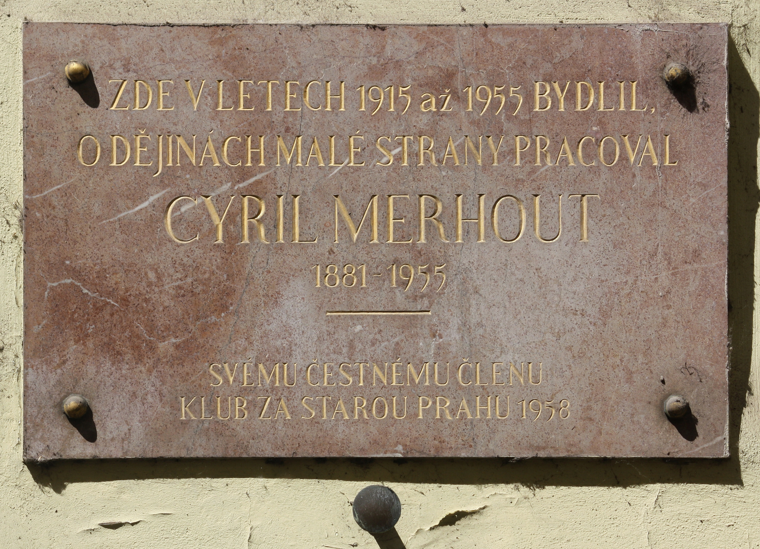 Praha 1 - Malá Strana, Vlašská 364/2, Pamětní deska Cyrila Merhouta